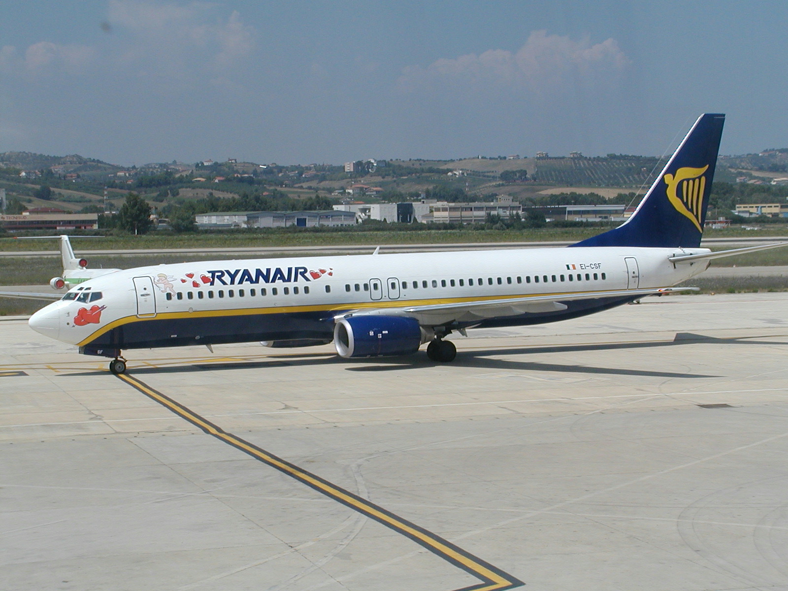 Die Maschine aus London rollt zu Parkposition in Pescara